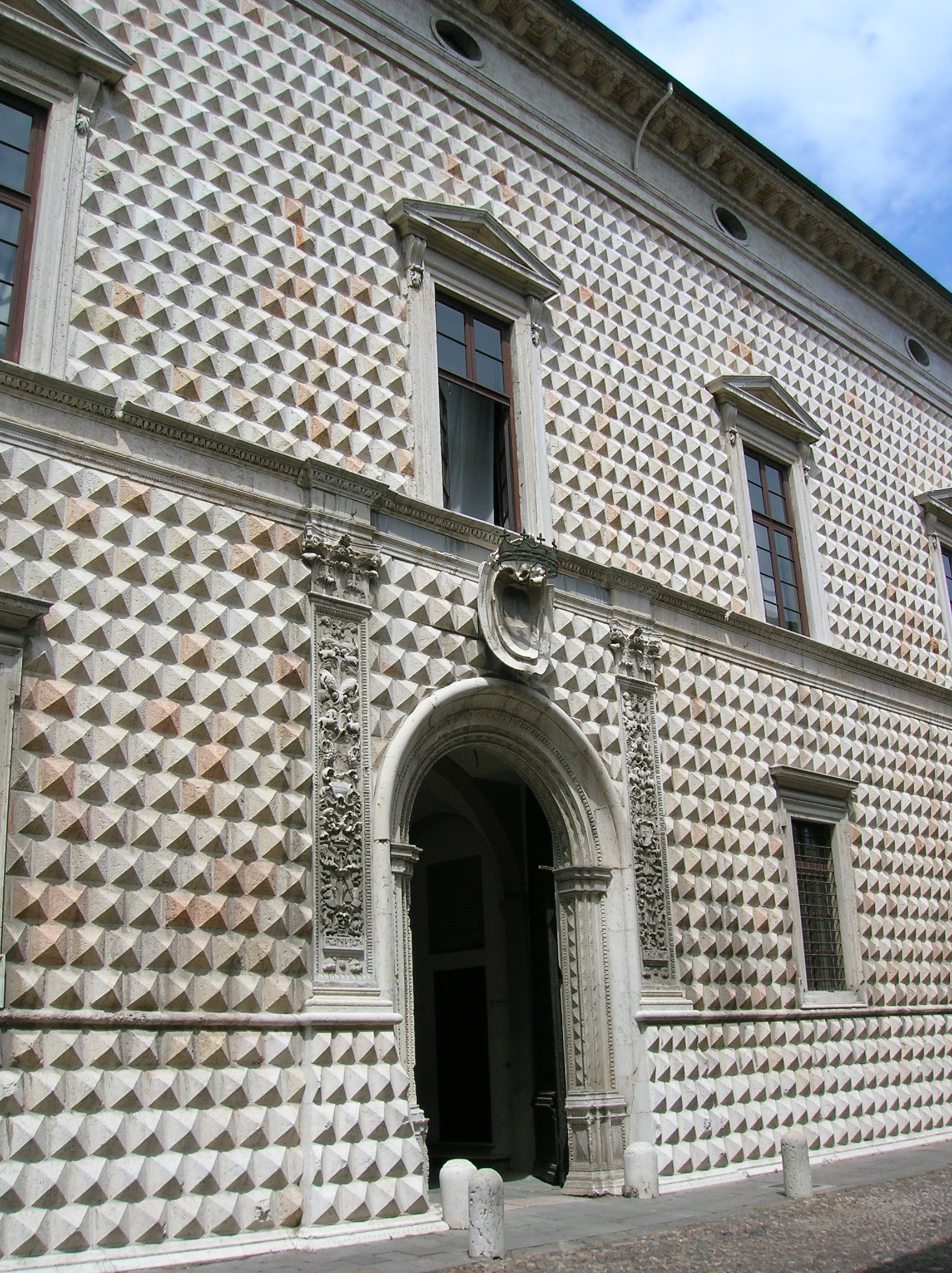 Palazzo dei diamanti, facciata principale